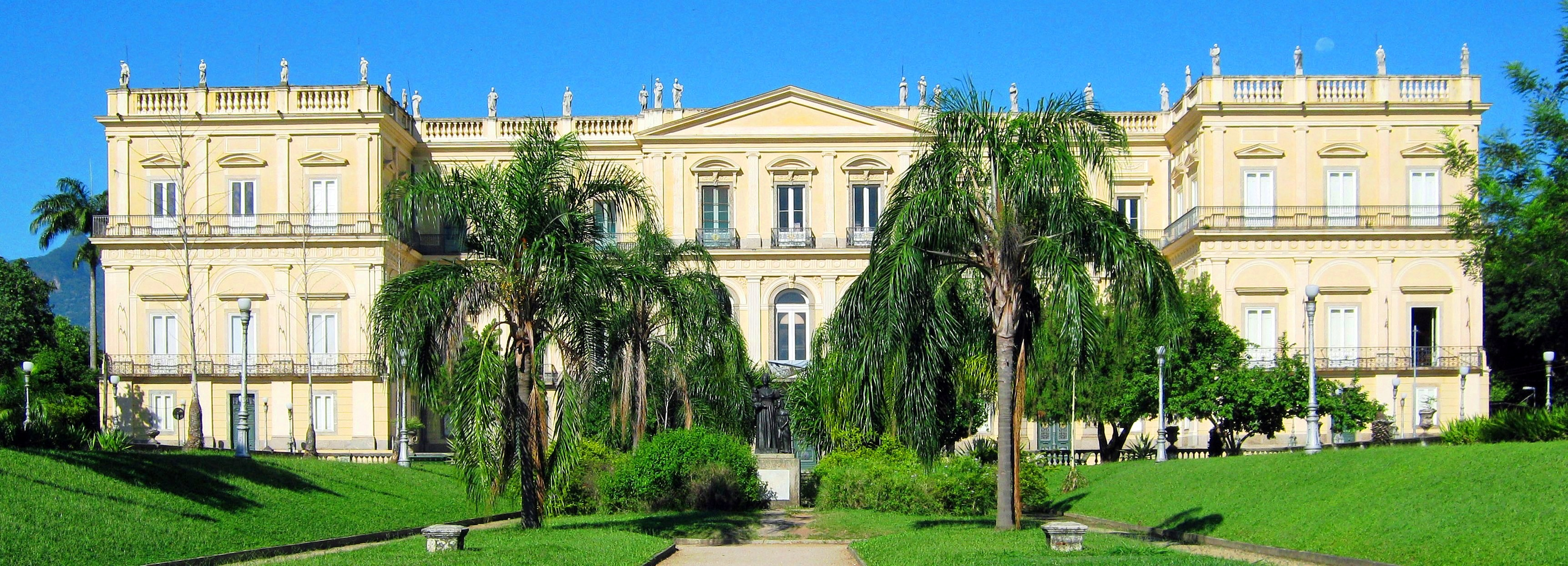 Museu Nacional da Universidade Federal do Rio de Janeiro.